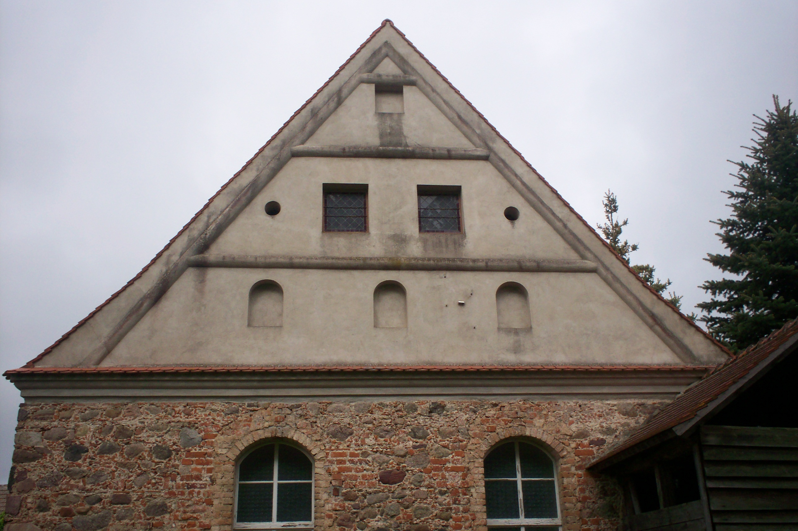 Banzendorf Nr. 71, Dorfkirche, Ostgiebel